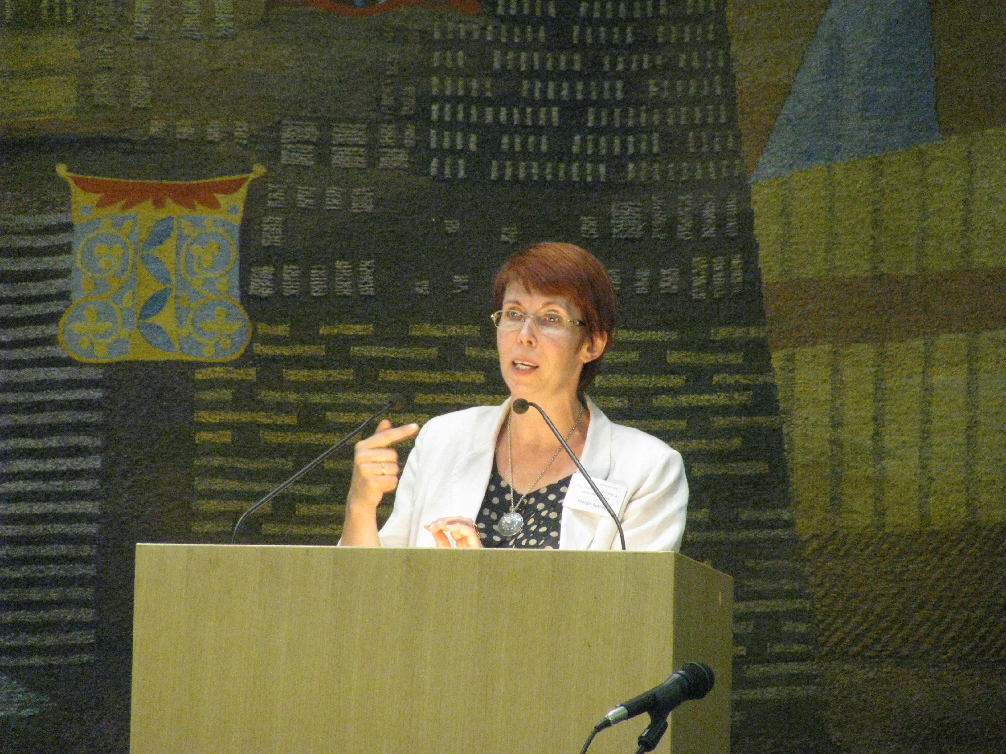 Margit Sutrop esinemas Eesti filosoofia 7. aastakonverentsil Tartus